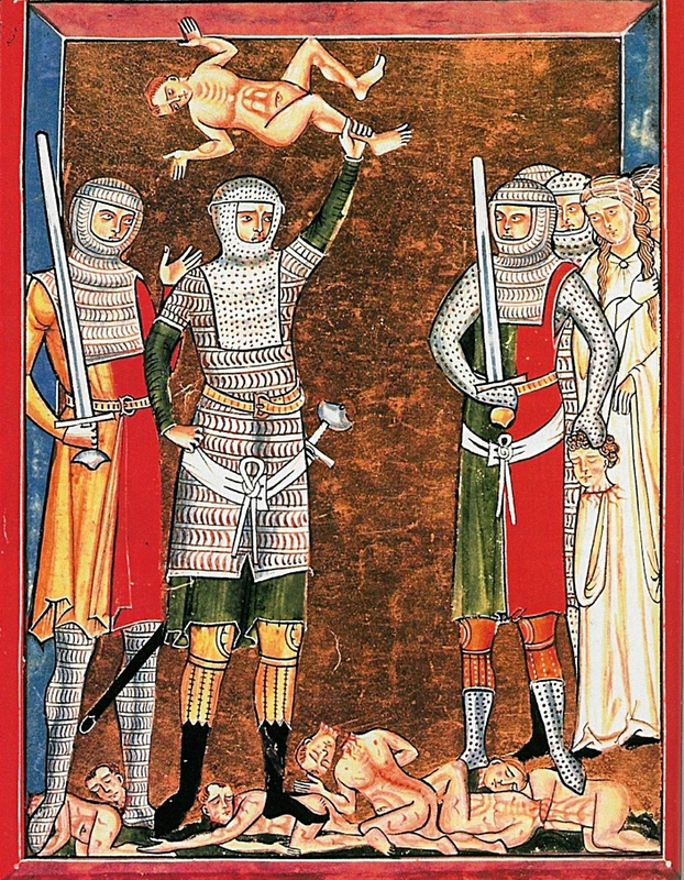 German manuscript